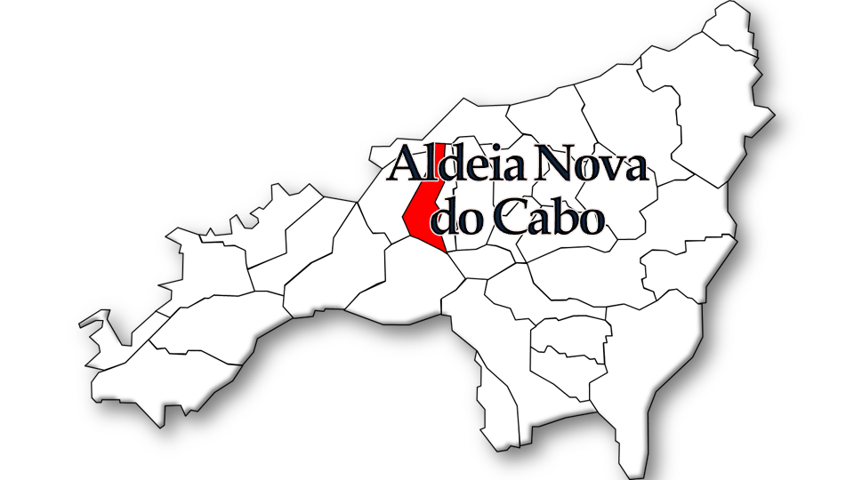 População